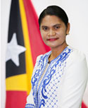 Lucia Taeki, Abgeordnete des Nationalparlaments Osttimors